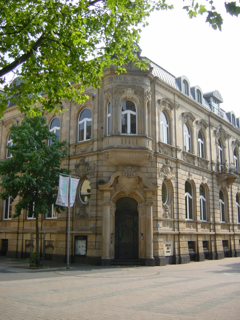 Bildbeschreibung: Standesamt Mitte, Krefeld Quelle: selbst fotografiert Fotograf/Zeichner: DER UNFASSBARE